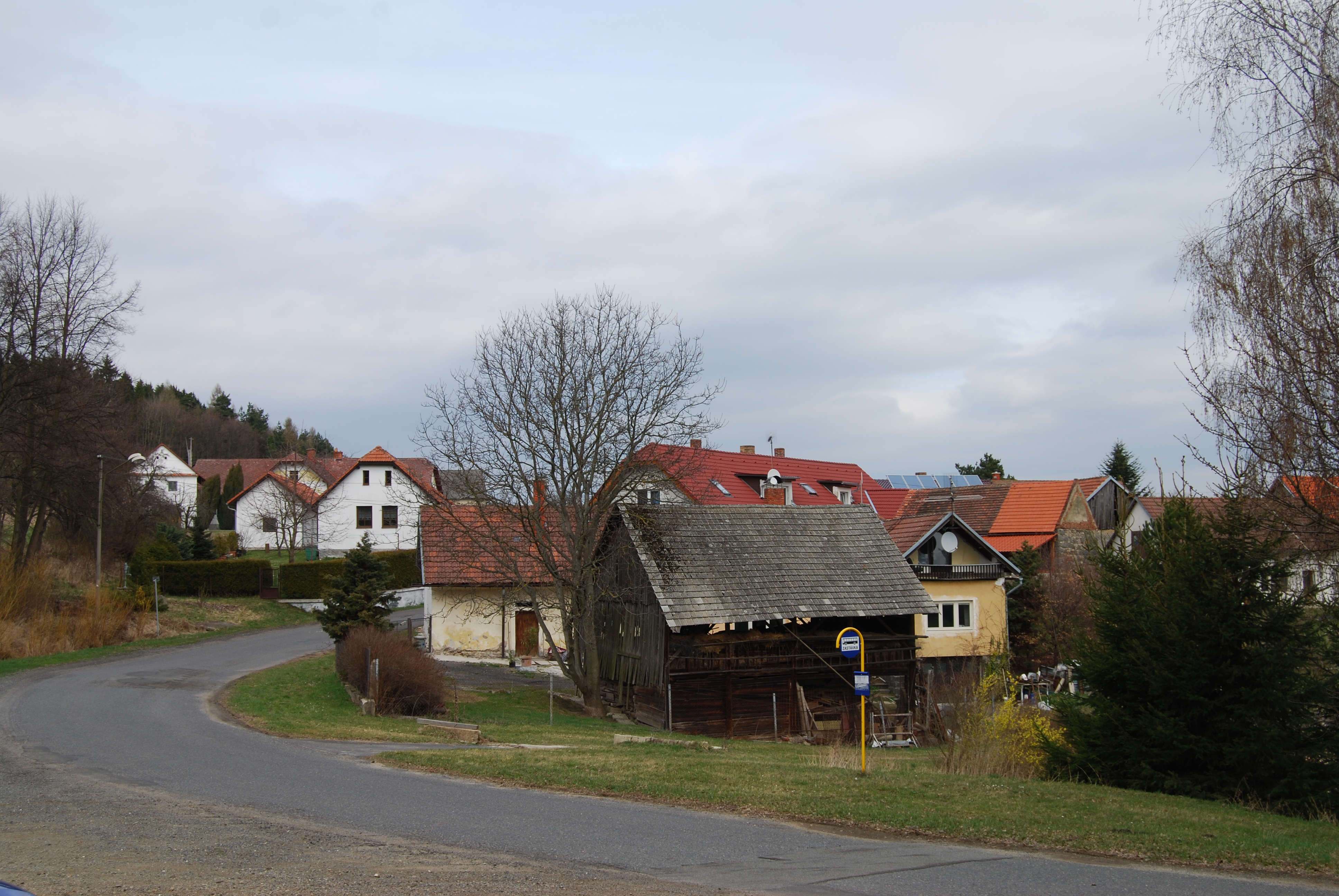 Pohled na obec ze směru od Petrovic. Kuníček (Petrovice) . Okres Příbram. Česká republika.